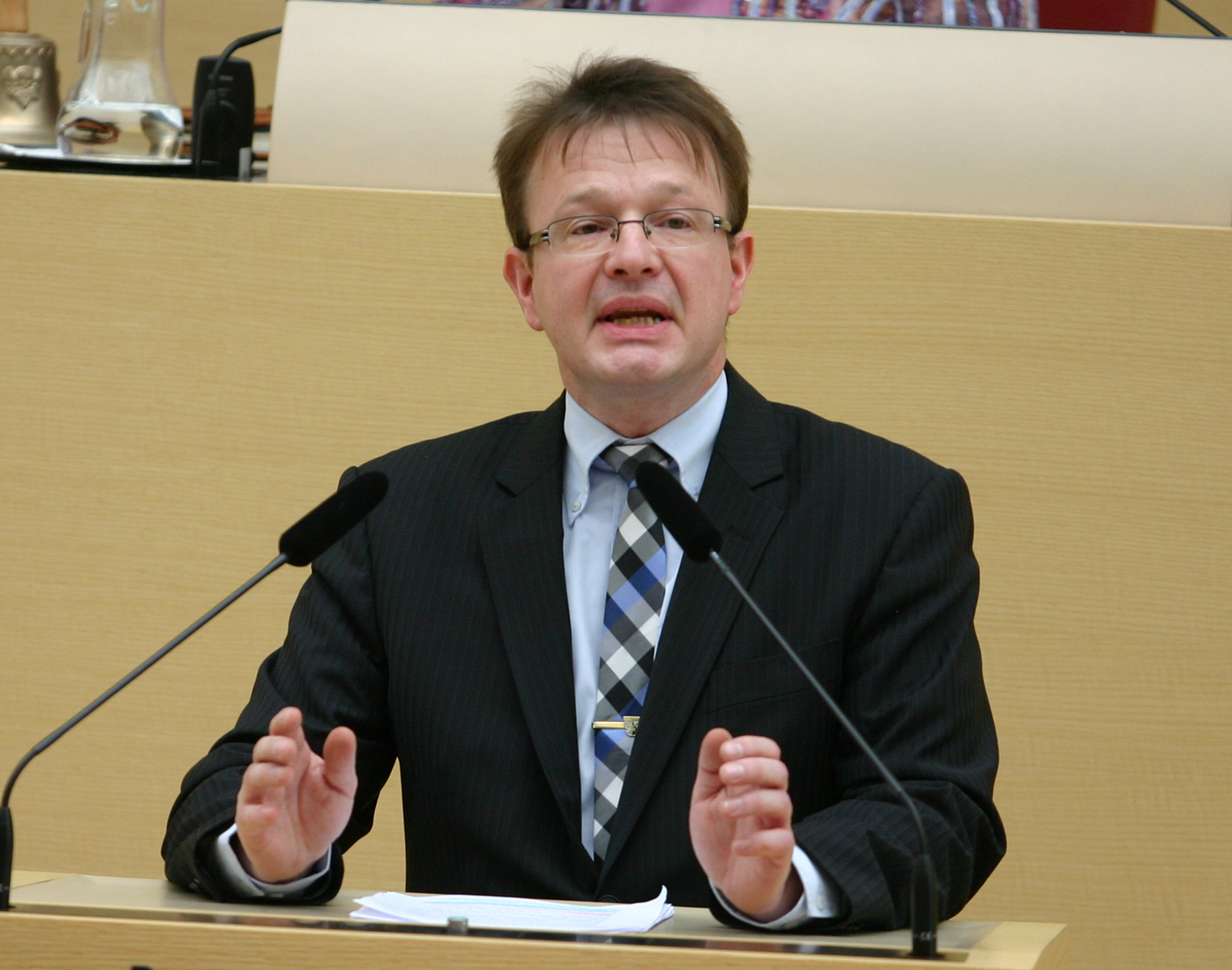 Dr. Andreas Fischer, deutscher Politiker (FDP), Abgeordneter im Bayerischen Landtag. Hier am 29. Februar 2012 bei einer Rede im Plenarsaal.